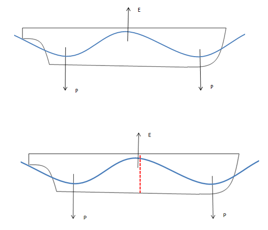 Kebrantoa olatuen ondorioz